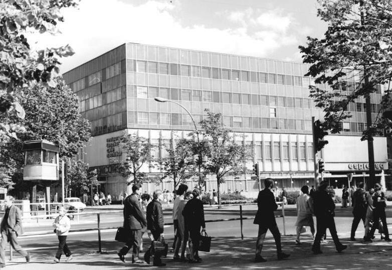 Berlin, "Lindencorso" ADN-ZB Hesse 3.11.1972 Berlin: Friedrichstraße Ecke Unter den Linden mit dem Restaurant "Lindencorso".